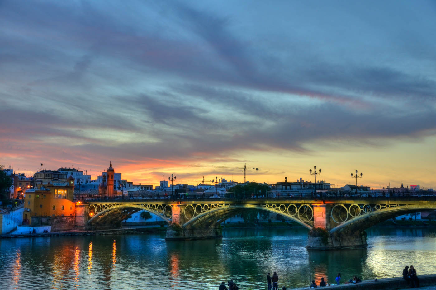 Puente de Triana al anochecer. Sevilla, España.